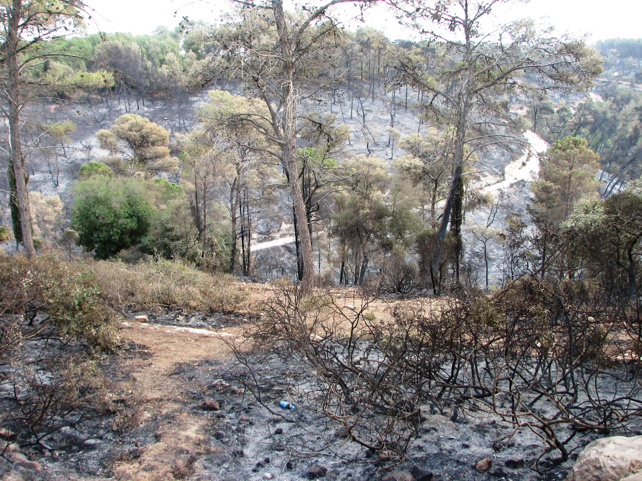 2010 Carmel forest - after fire near Isfiya יער ליד עספיא שנשרף, בשרפה של הכרמל בדצמבר 2010